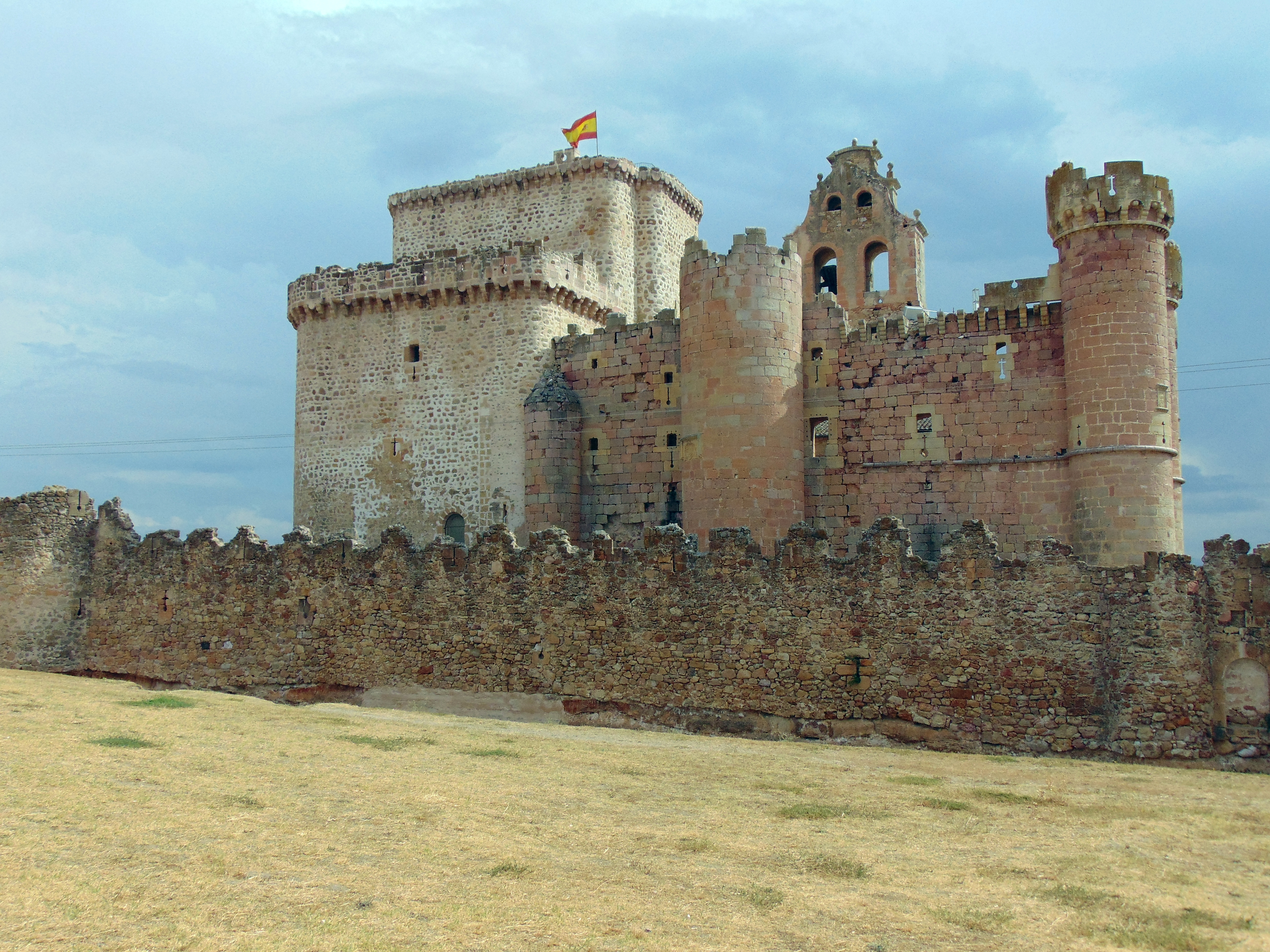 Castillo de Turégano (Segovia)